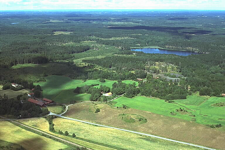 Motiv: Mormorsgruvan Nyckelord: Flygbilder, Riksintressen Kategori: Bruksmiljö .